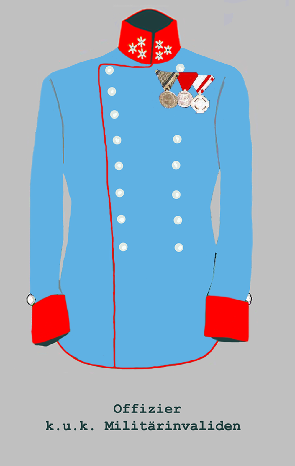 Hauptmann des Invalidenversorgungsstandes